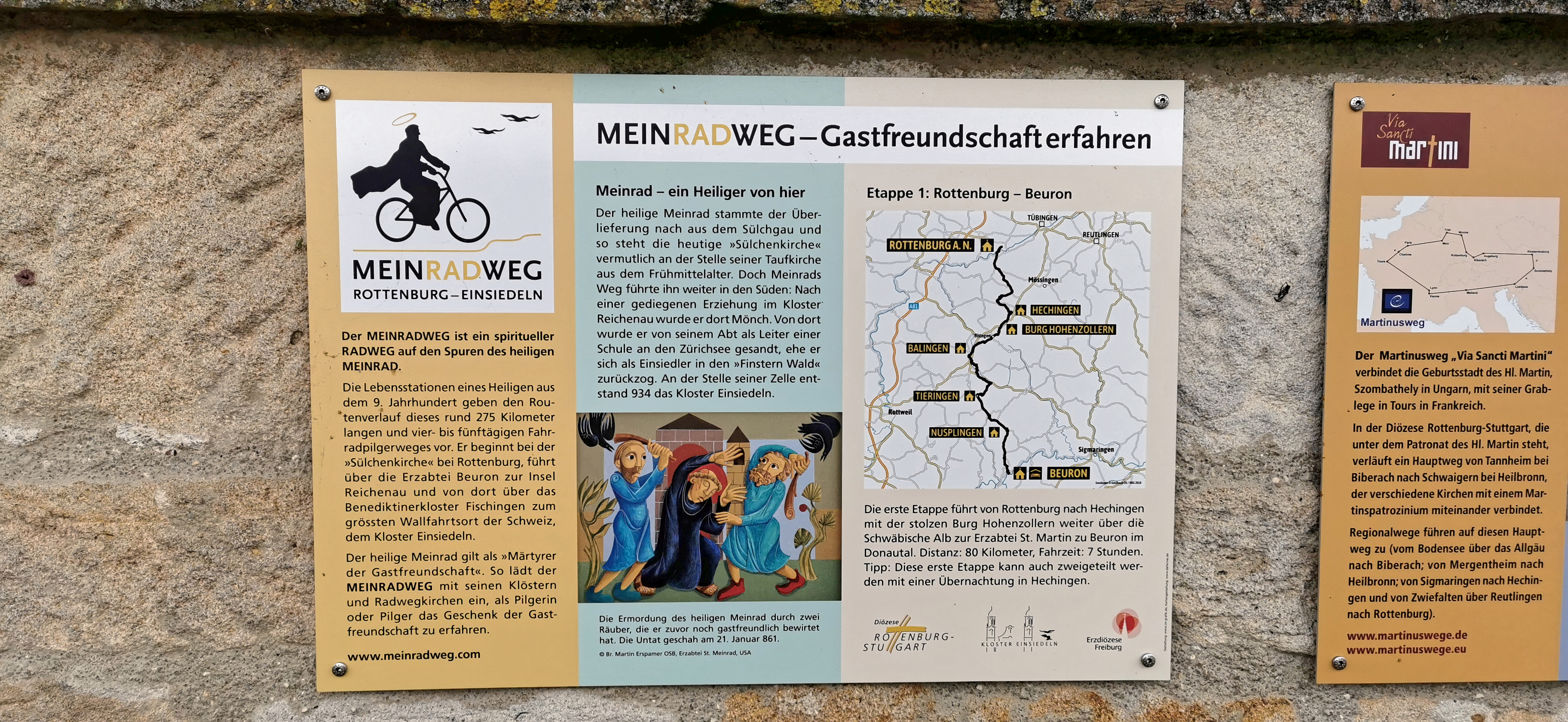 Rottenburg am Neckar -Sülchenkirche- 2019